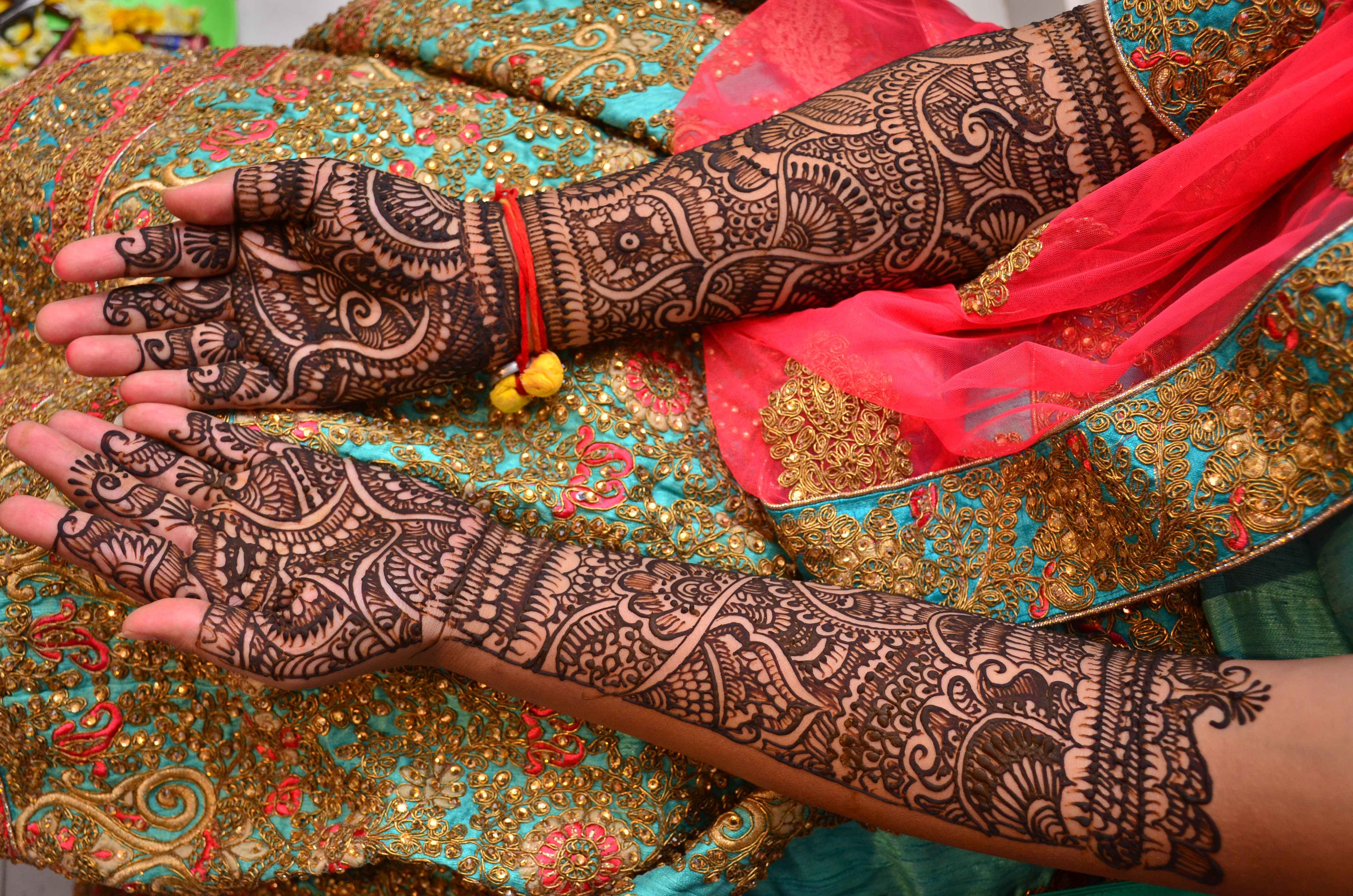 Yeh chitra dulhan ki shadi se pehle haldi rasm ko darshata hai.